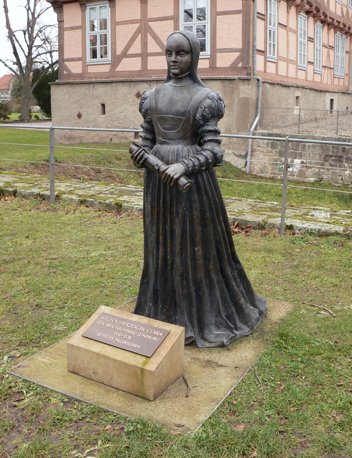 Statue der Herzogin Clara Sitz am Schloss Fallersleben